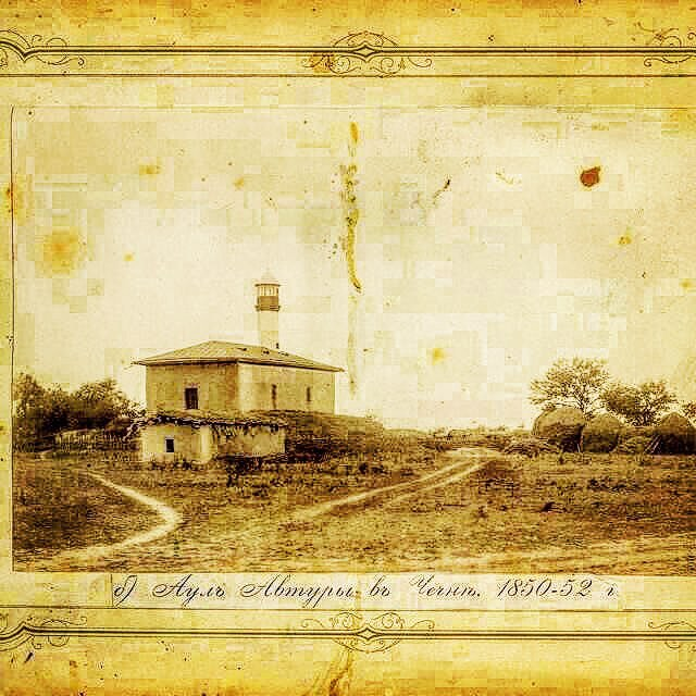 деревня Автур - Русско-Кавказская война Чечня